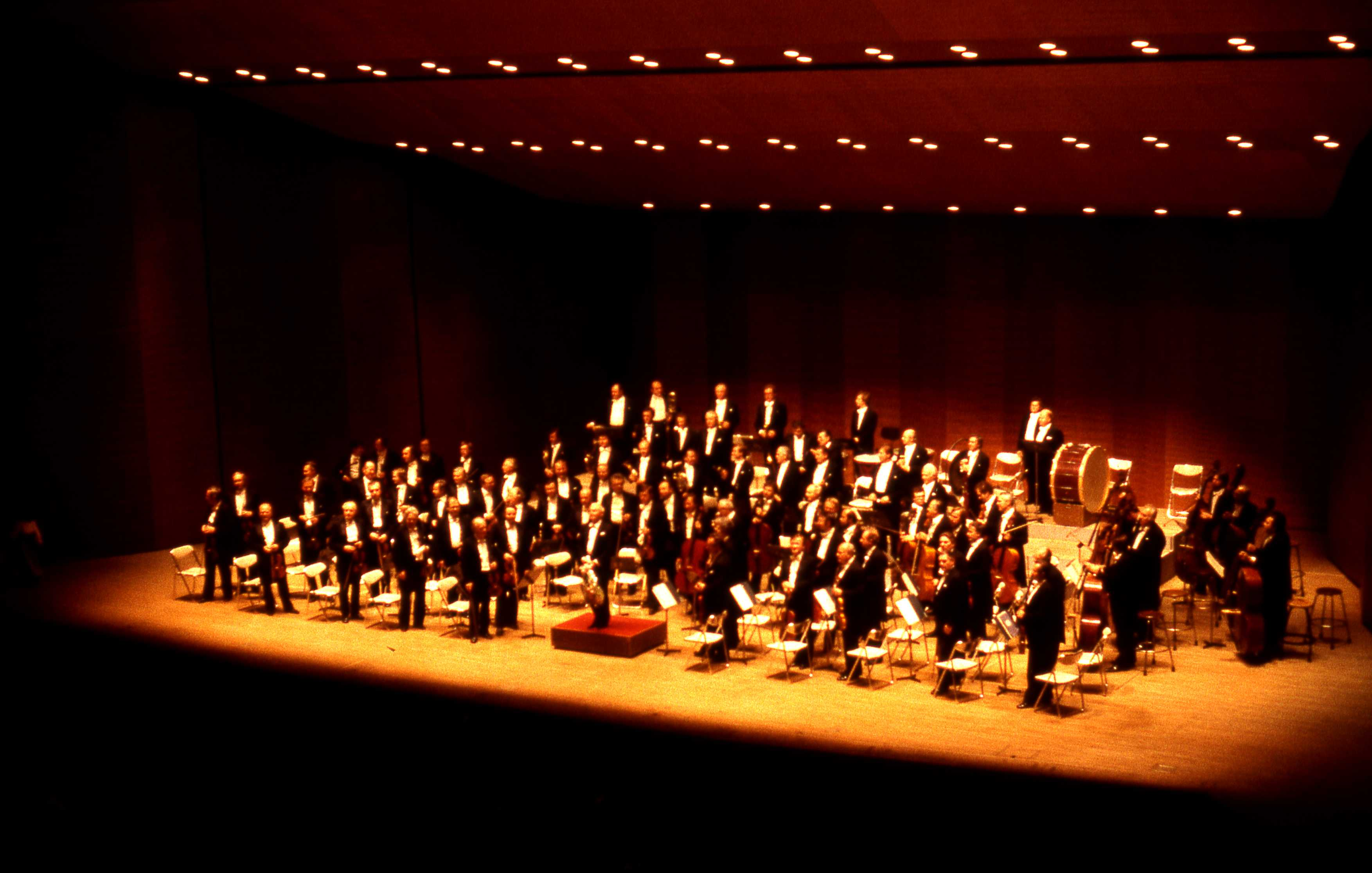 1982.11.13 神戸 神戸文化ホール スメタナ 歌劇「売られた花嫁」序曲 モーツァルト バイオリン協奏曲第３番 バイオリン：ヨゼフ・スーク チャイコフスキィ 交響曲第６番「悲愴」 ヴァーツラフ・ノイマン指揮